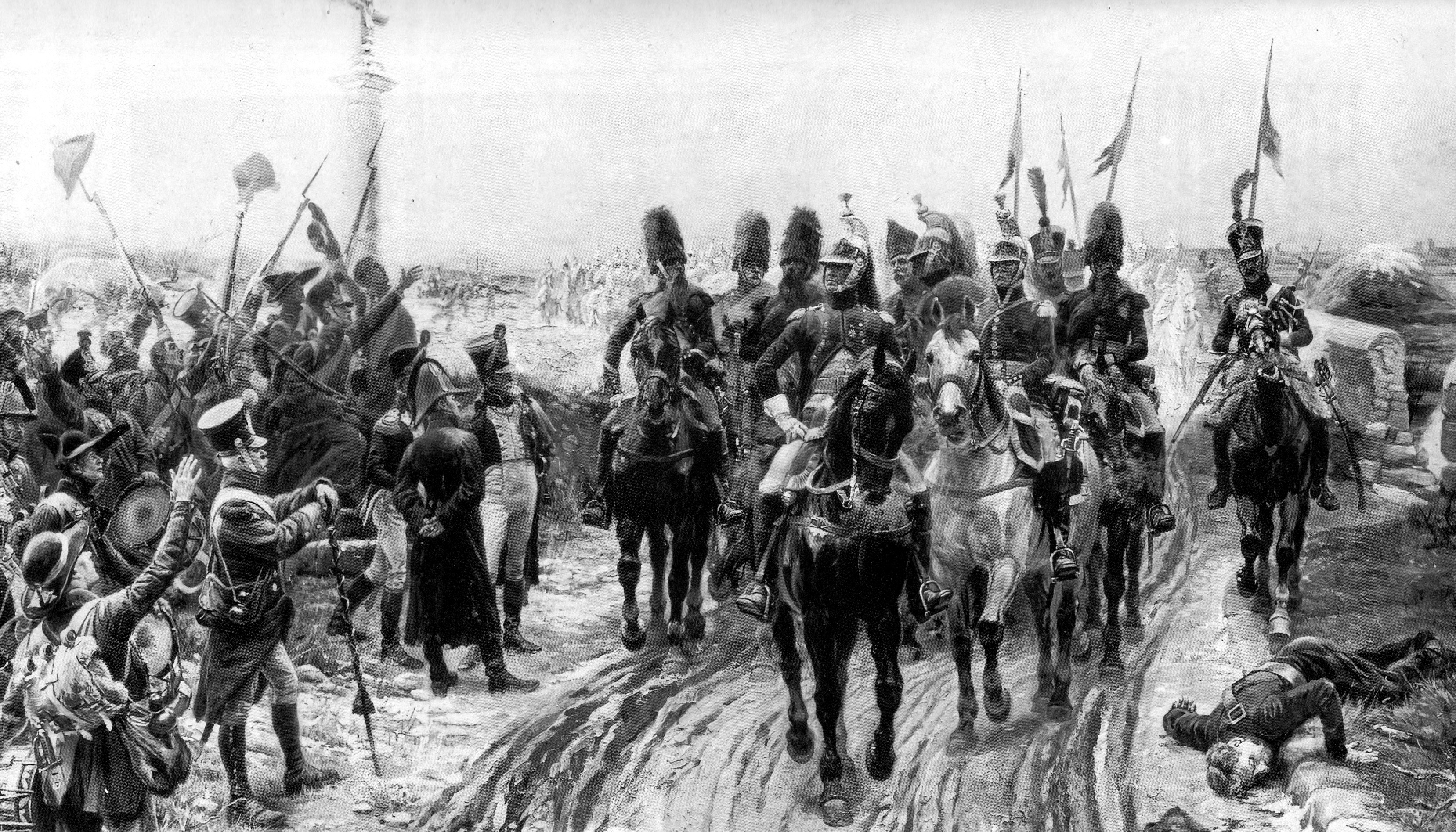 Retour des dragons de l'armée d'Espagne pendant la campagne de France, en 1814. Napoléon, qui manque de soldats expérimentés face aux troupes de la Coalition, rappellent des unités venant d'Espagne. Les divisions de dragons des généraux Trelliard et Roussel d'Hurbal viennent alors renforcer le 6e corps de cavalerie de Kellermann, avec lequel elles participent à la campagne de France.